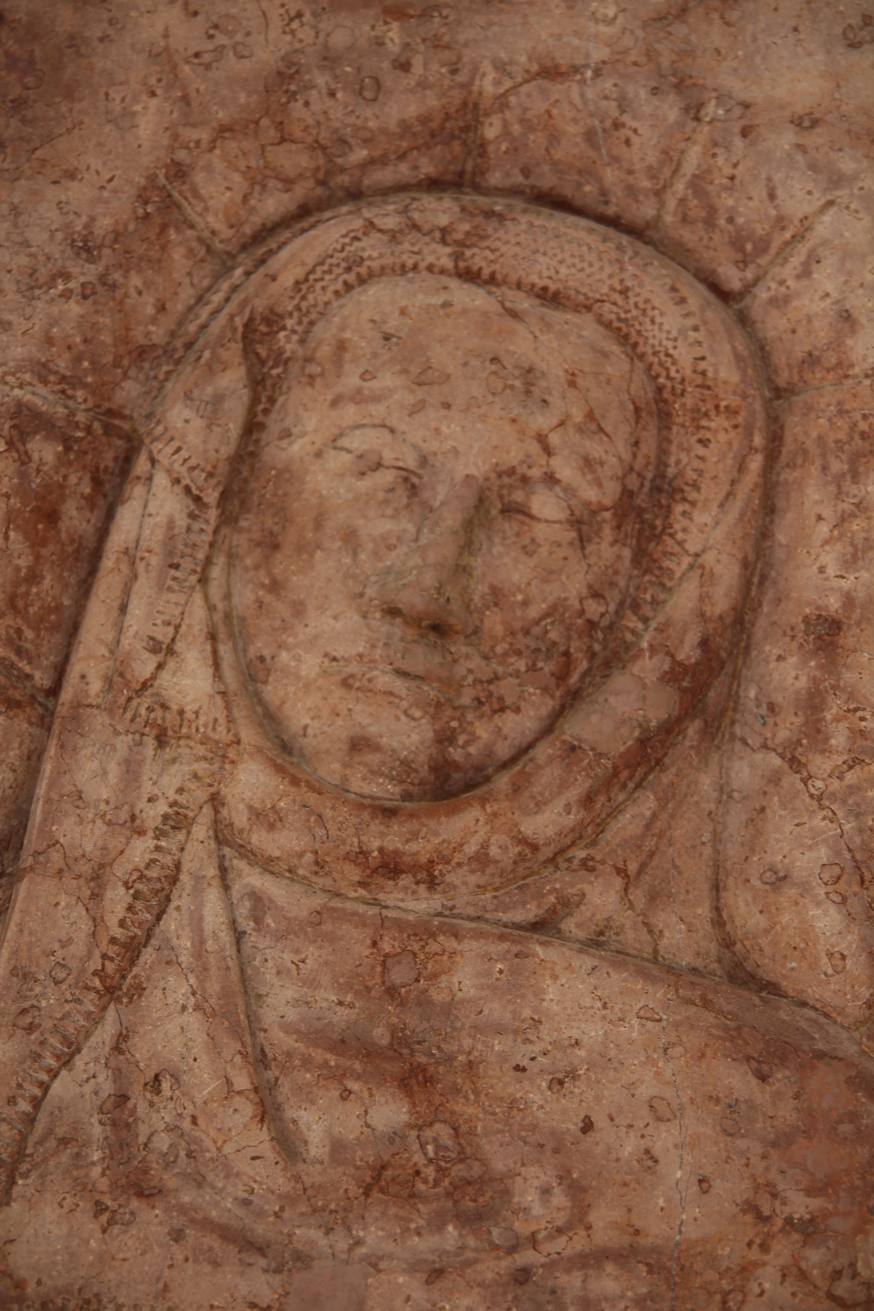 Epitaph der Agnes Bernauer in Straubing - Detail Gesicht